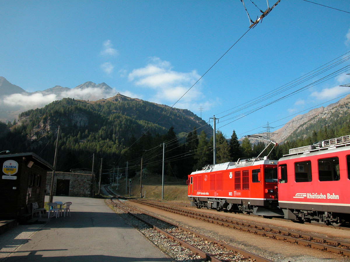 Cavaglia, Bahnstation, 2003